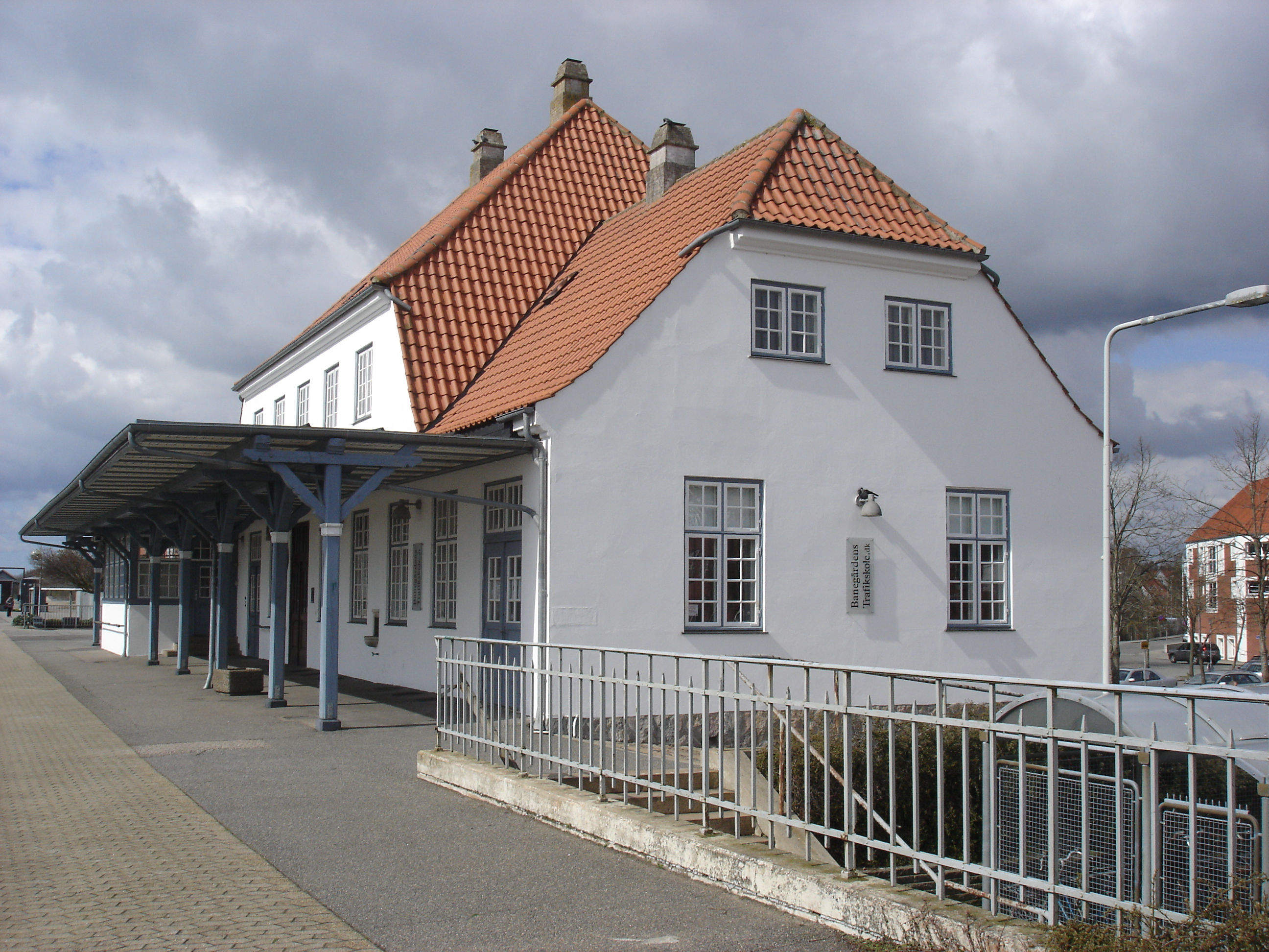 Vejen Station, sporsiden fra S